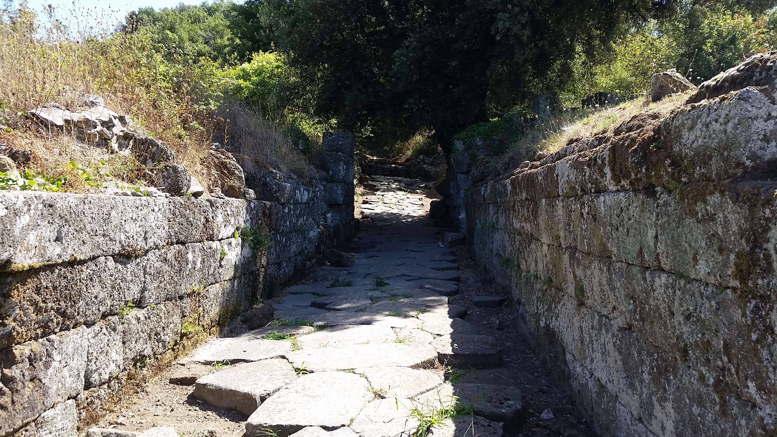 Salita all'acropoli di Tuscolo (via tecta)